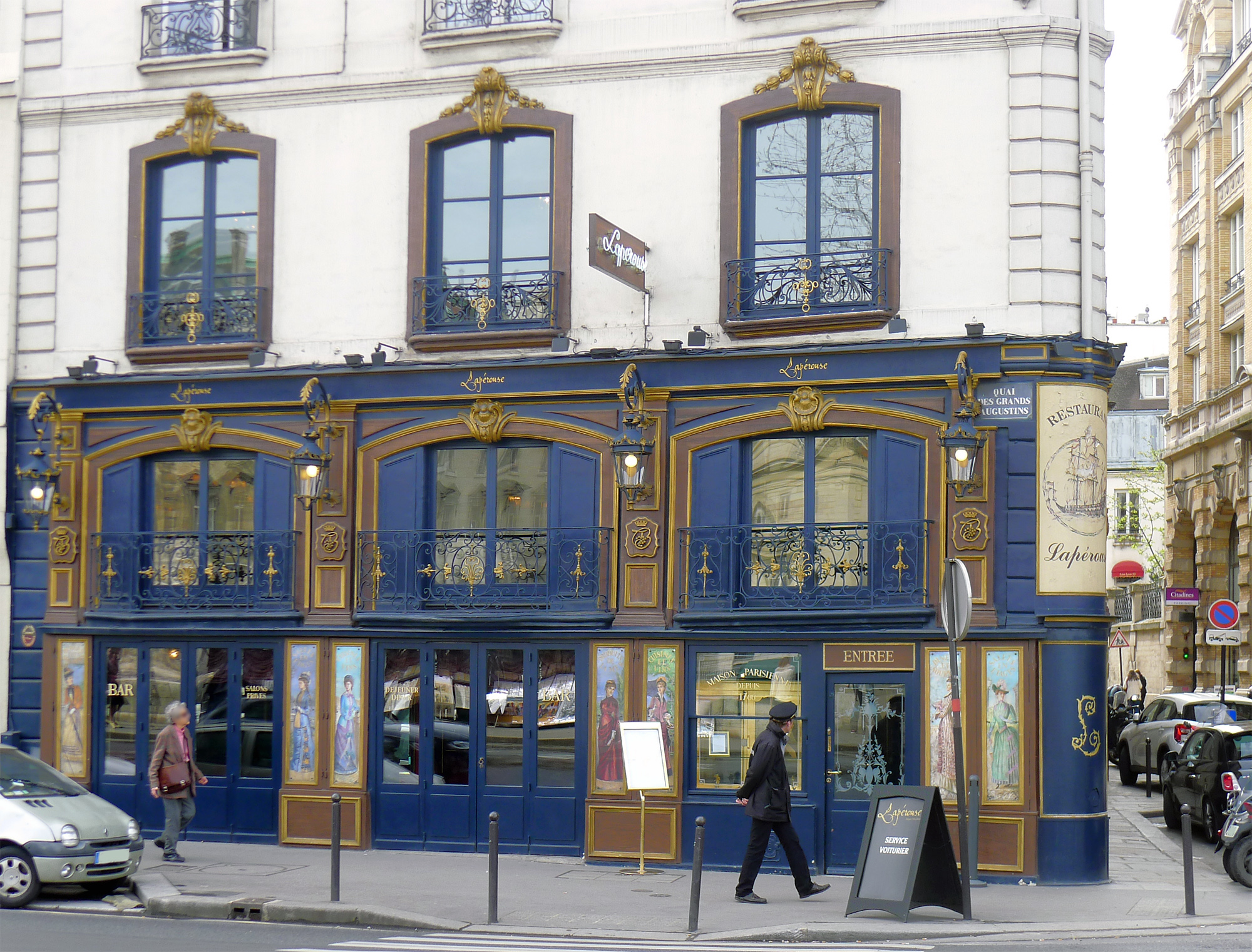 Restaurant Lapérouse (51, quai des Grands-Augustins) - Paris VI